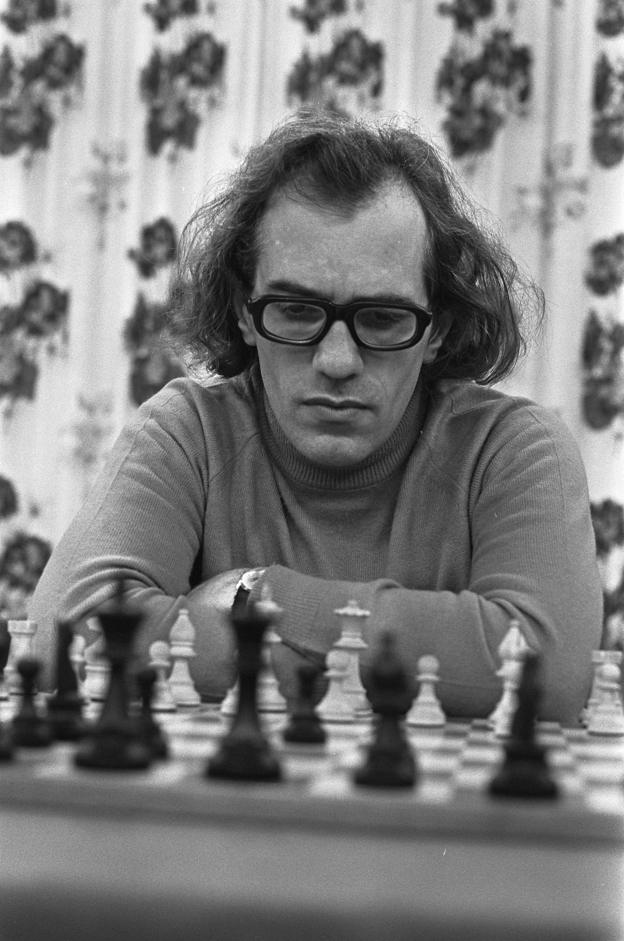 Hoogovenschaaktoernooi te Wijk aan Zee 1973, Enklaar.